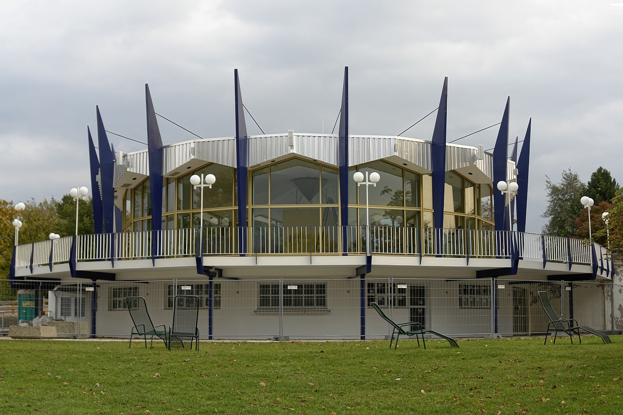 Der 1974 entstandene Veranstaltungspavillon ist heute wichtiger Repräsentant der DDR-Architekturmoderne.